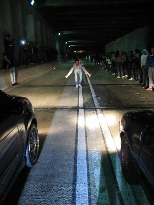 carreras clandestinas ilegales en la ciudad de bogotá